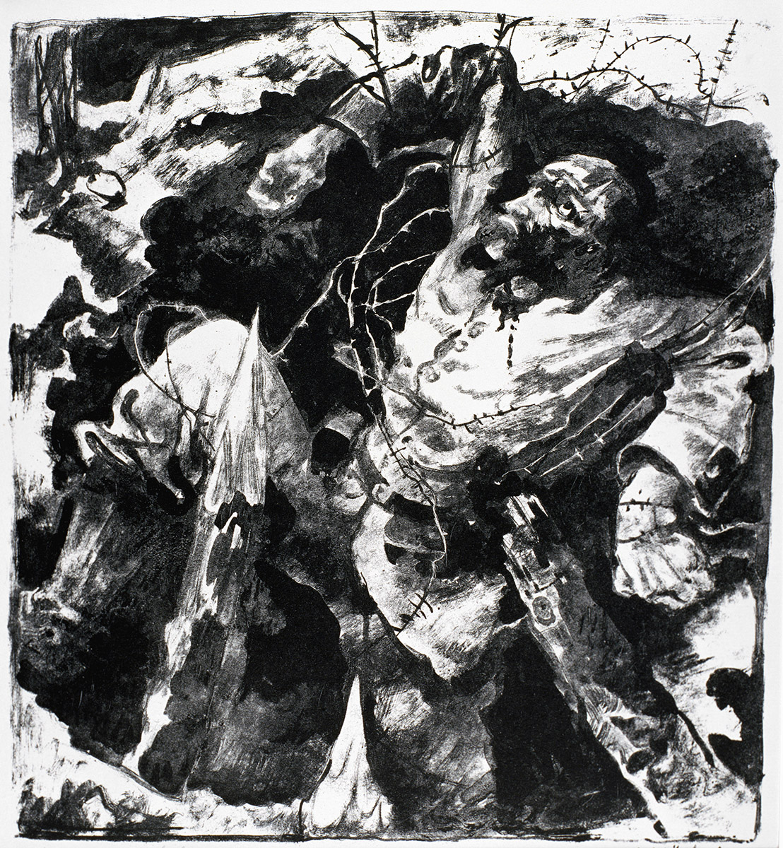 Du portfolio Memento, 1914-1915. Achat en 1916.